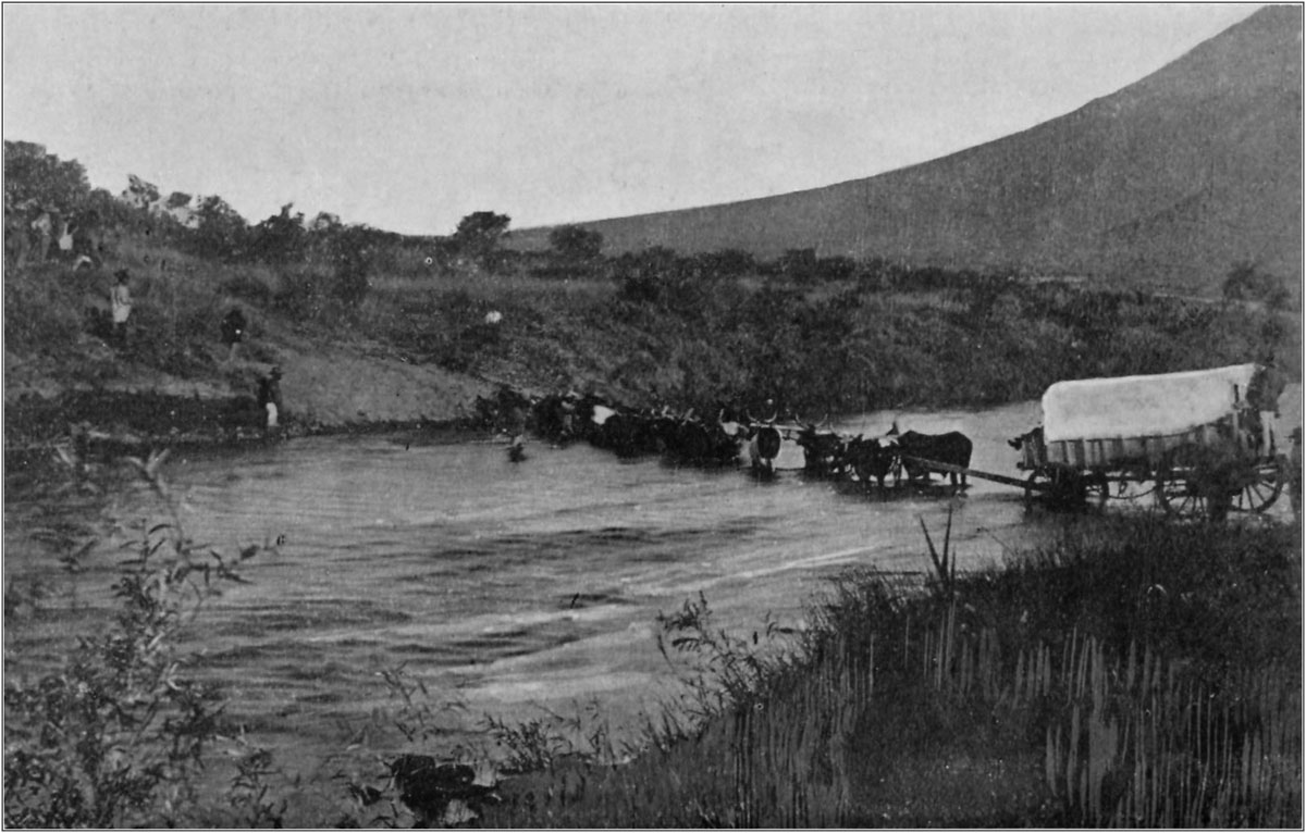 Chariot traversant la rivière Orange, 1900